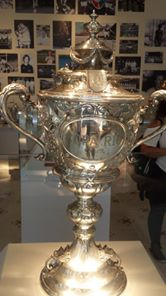 Taça da Copa Rio de 1952 - Segunda edição da primeira competição de futebol intercontinental do mundo.